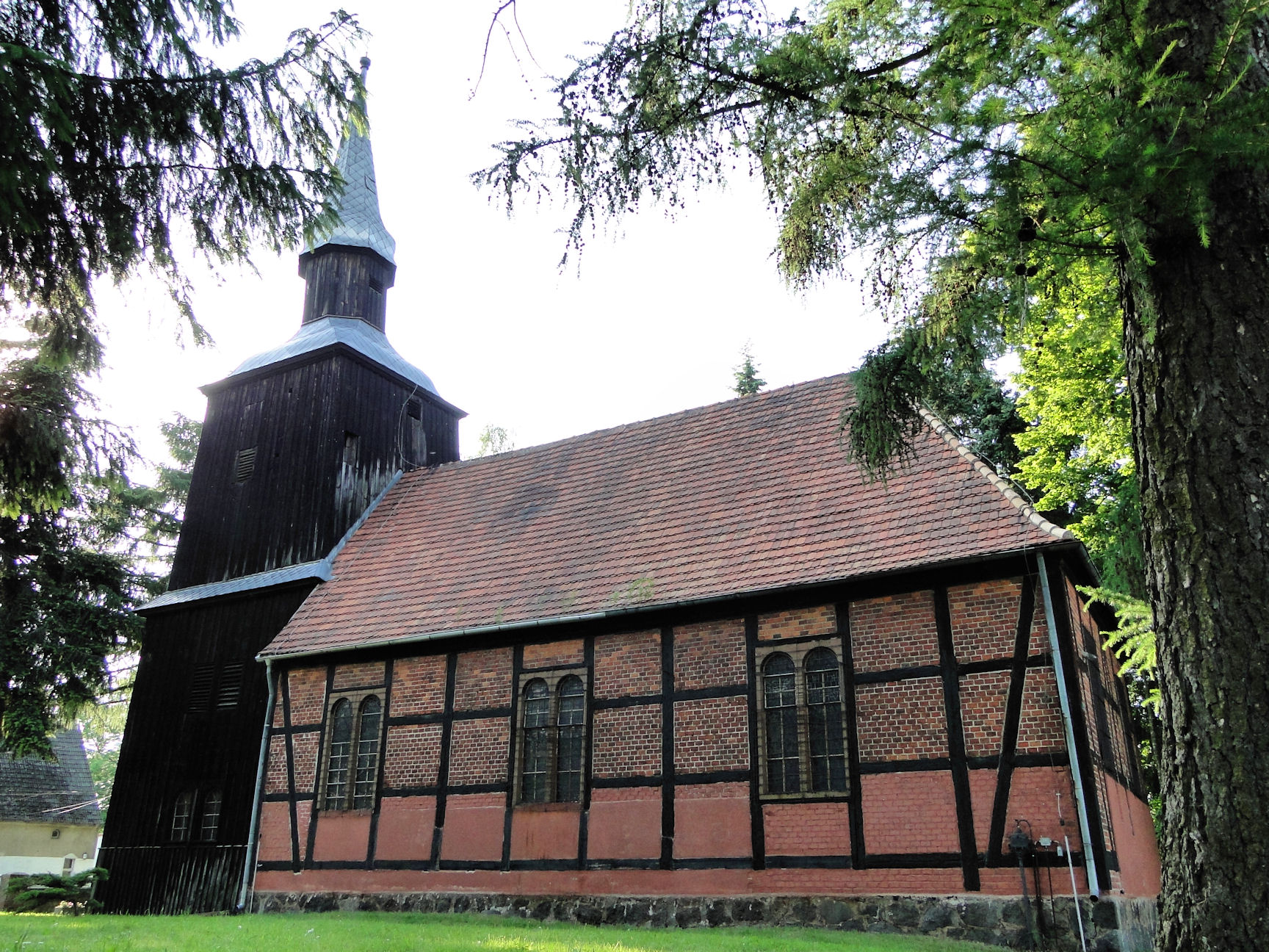 Kościół przy ul. Klonowej w Szczecinie Płoni